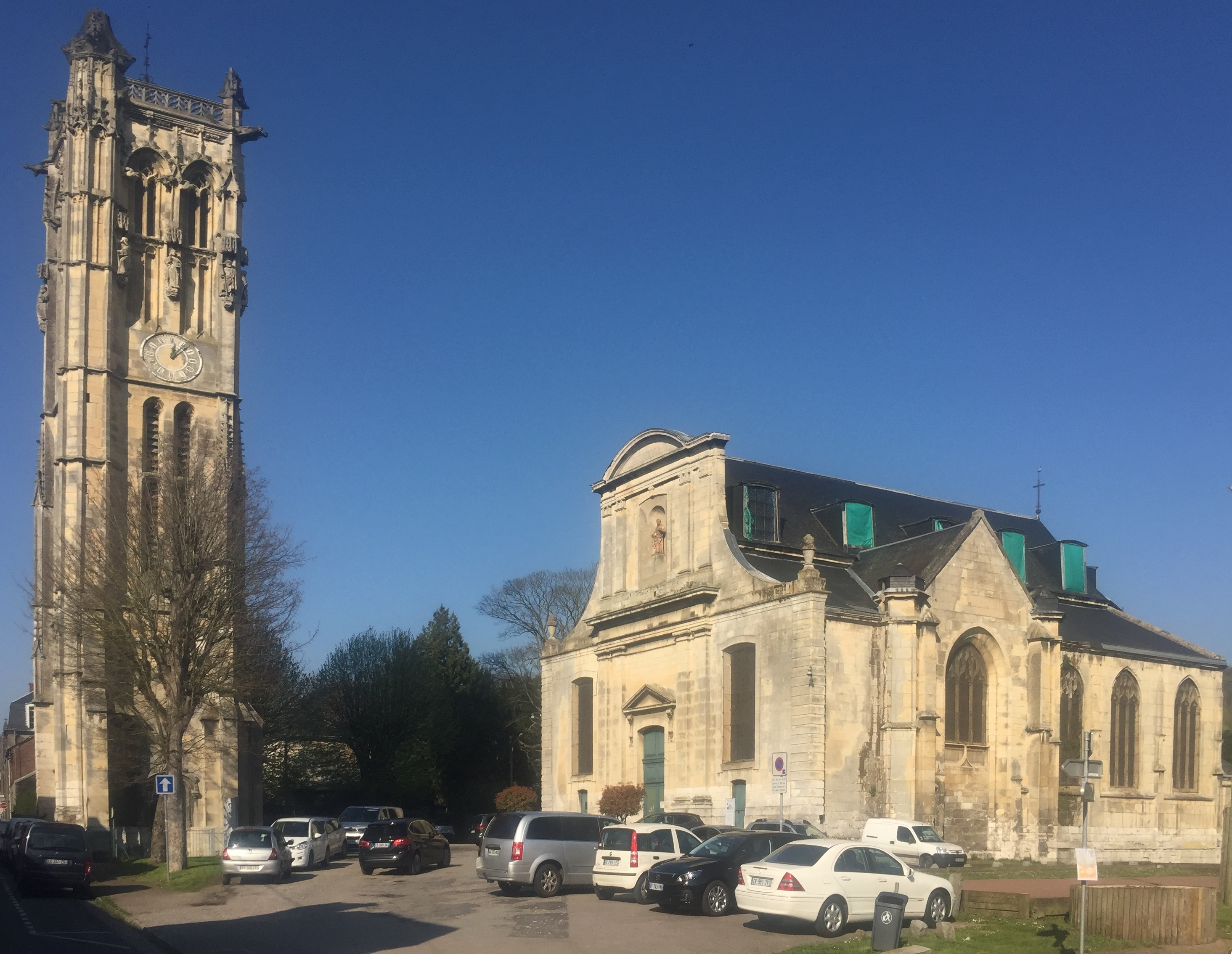 Nrf: Eglise Saint-Pierre ed Carville en avril ed 2019.